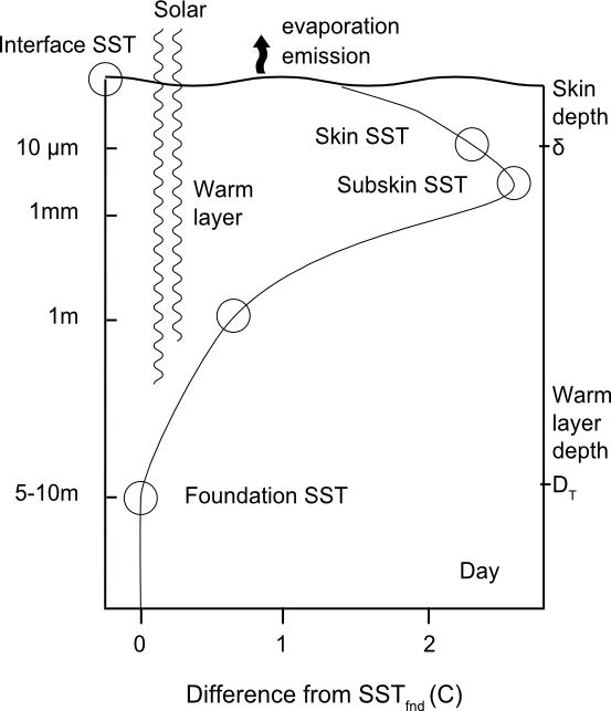 sea surface temperature